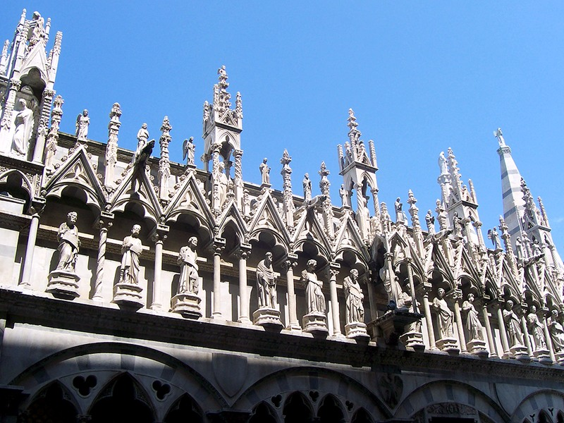 Pisa - Decorazione esterna della Chiesa di S. Maria della Spina